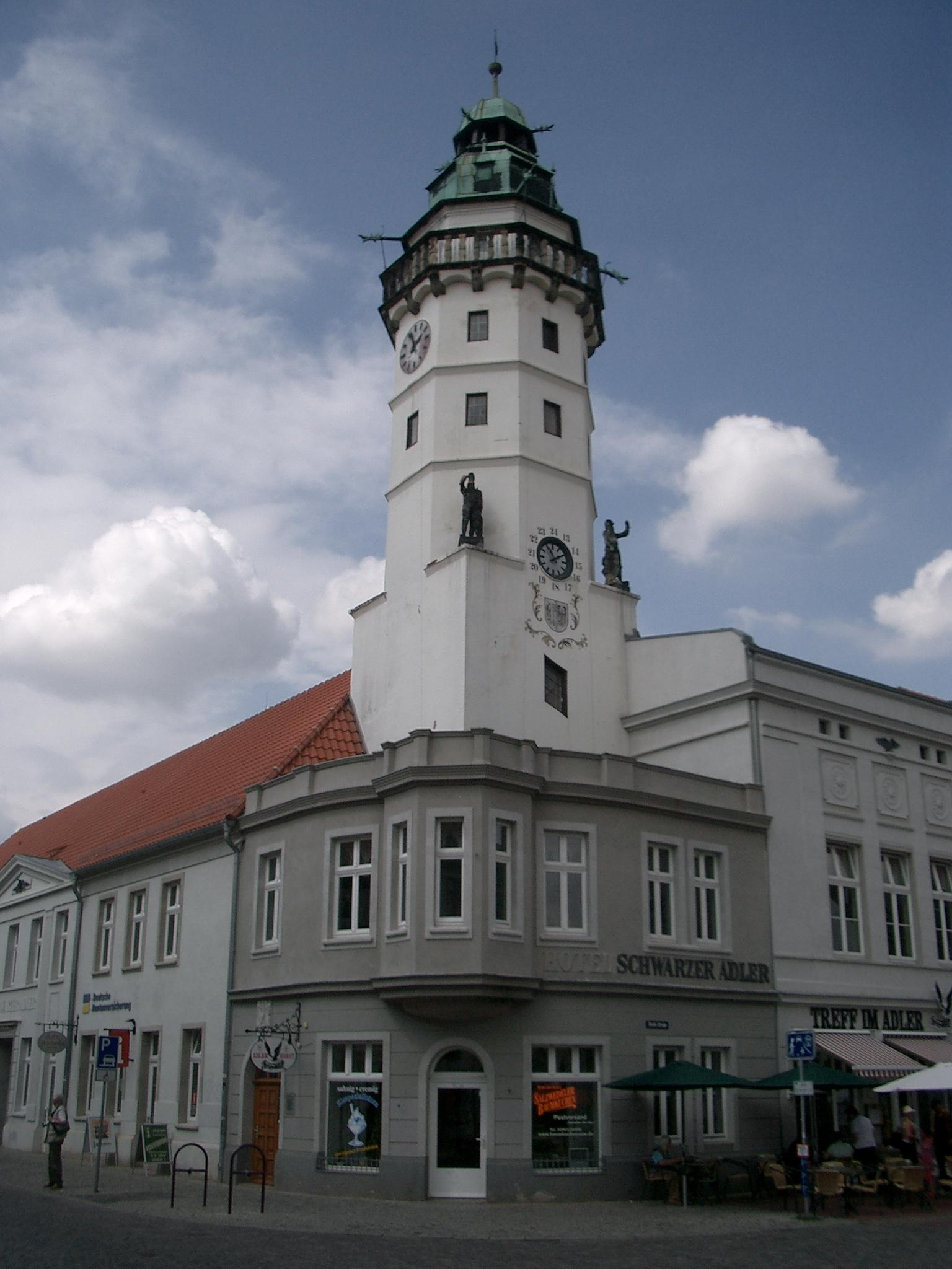 Rathausturm in Salzwedel mit Hotel Schwarzer Adler